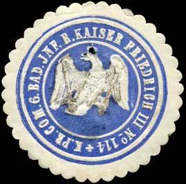 Sealing stamp Title: Königlich Preussische Commando 6. Badisches Infantrie Regiment Kaiser Friedrich III. No. 114 Description: blau, weiß, geprägt Place: Konstanz size: 4 cm